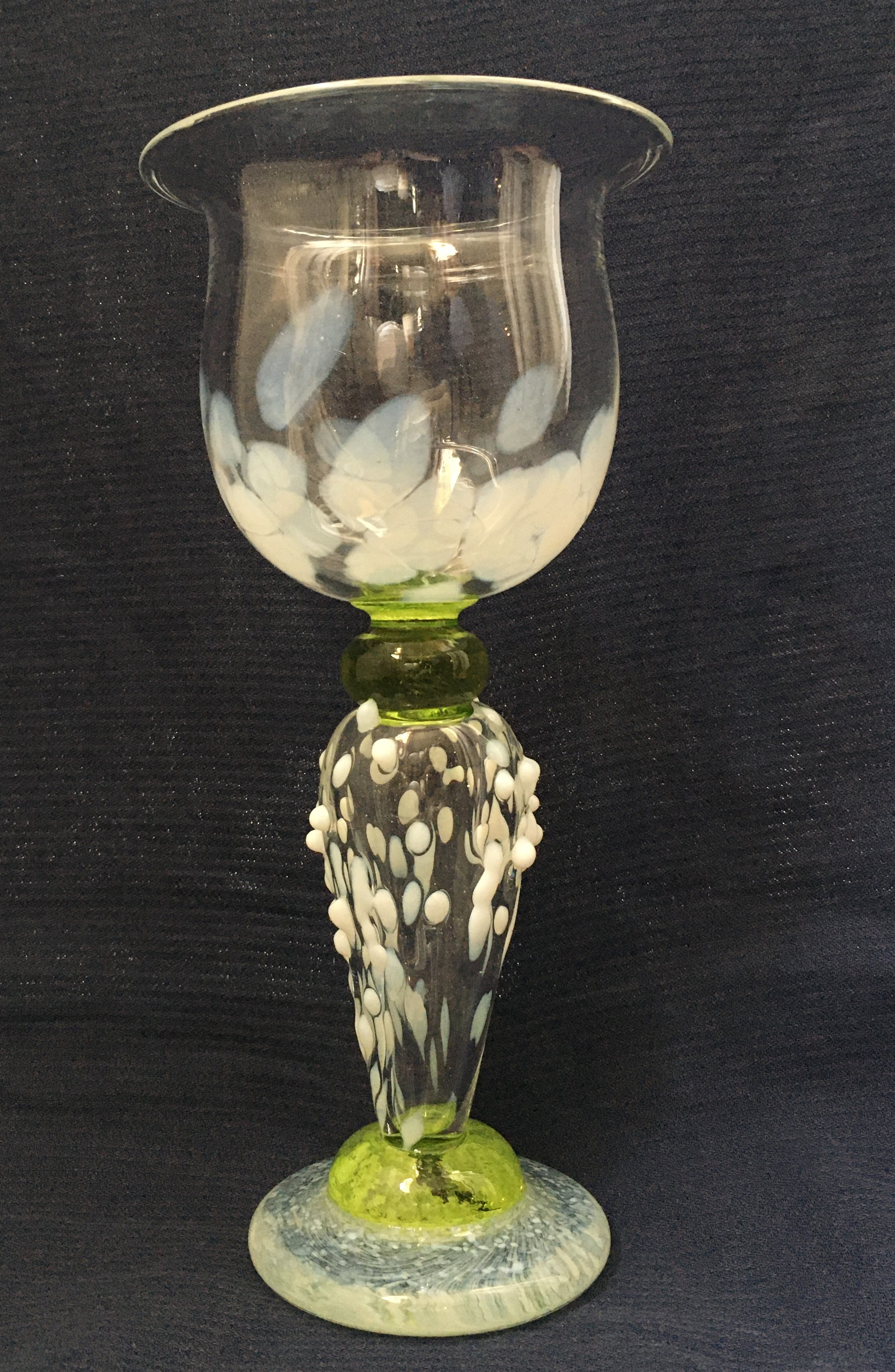 pokalglas av Åsa Brandt